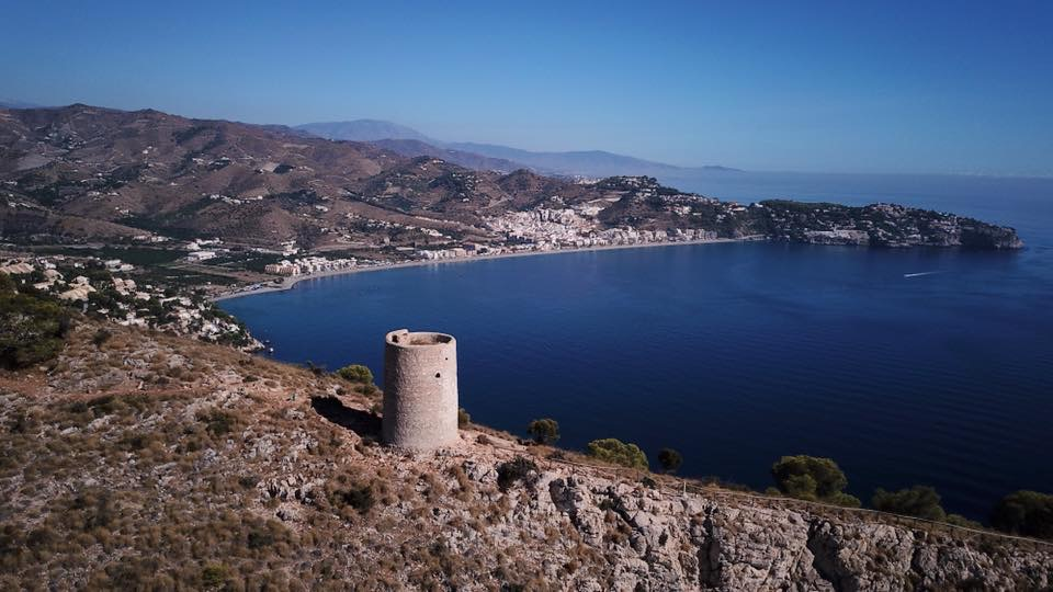 Torre de Cerro Gordo, La Herradura